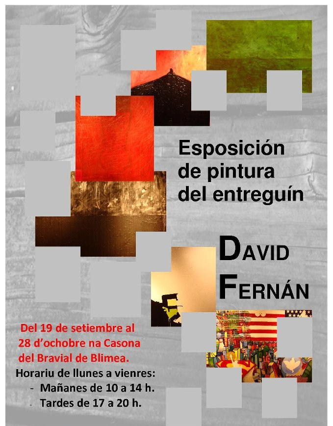 Esposición de dibuxu y pintura de David Fernán